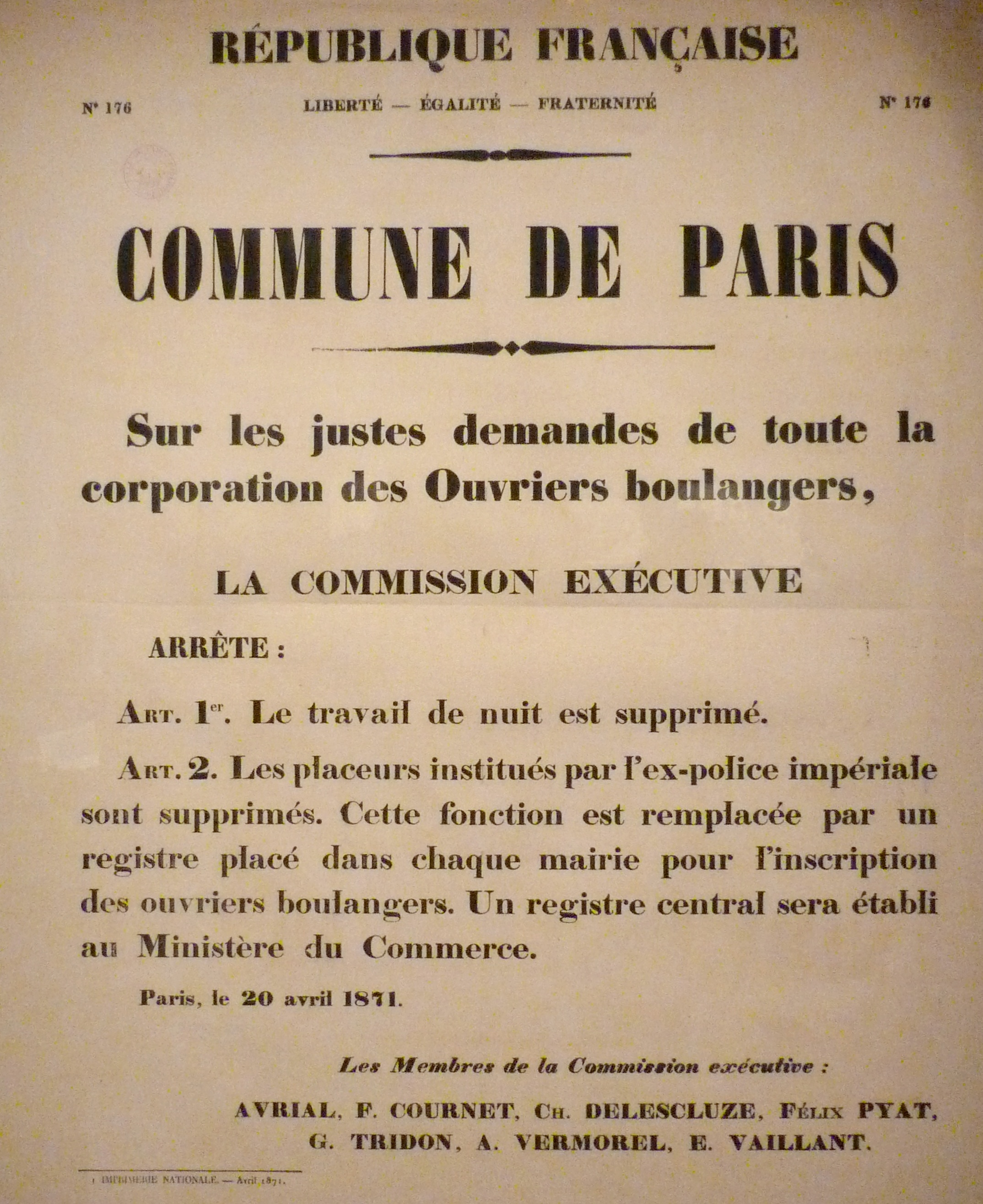 Exposition La Commune de Paris à l'Hôtel de Ville de Paris (18 mars - 28 mai 2011) - Affiche sur l'arrêt de la commission exécutive 20 avril 1871 supprimant le travail de nuit - Bibliothèque historique de la Ville de Paris.